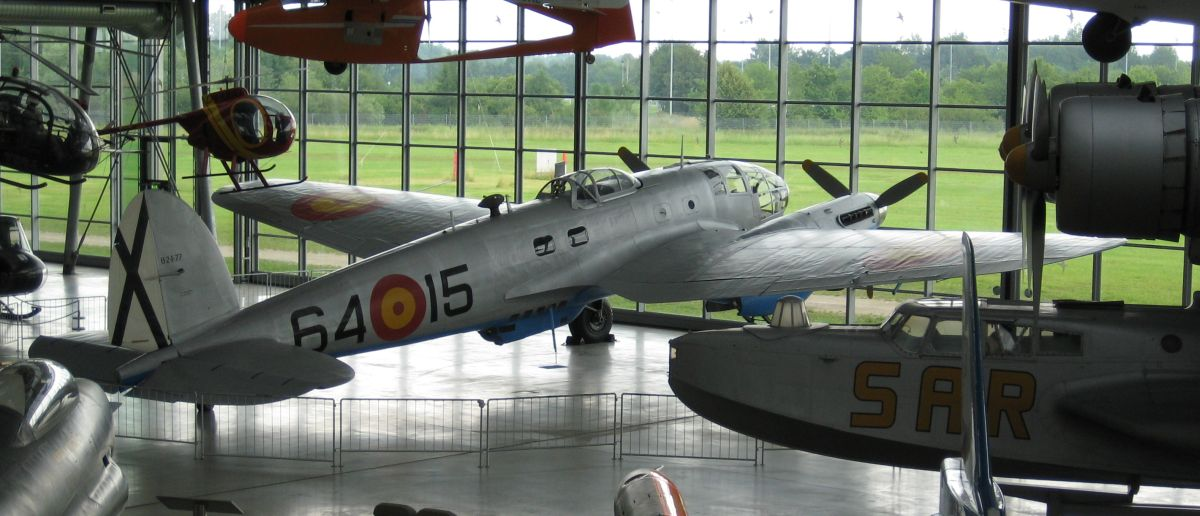 CASA 2.111B (HE-111 H16)